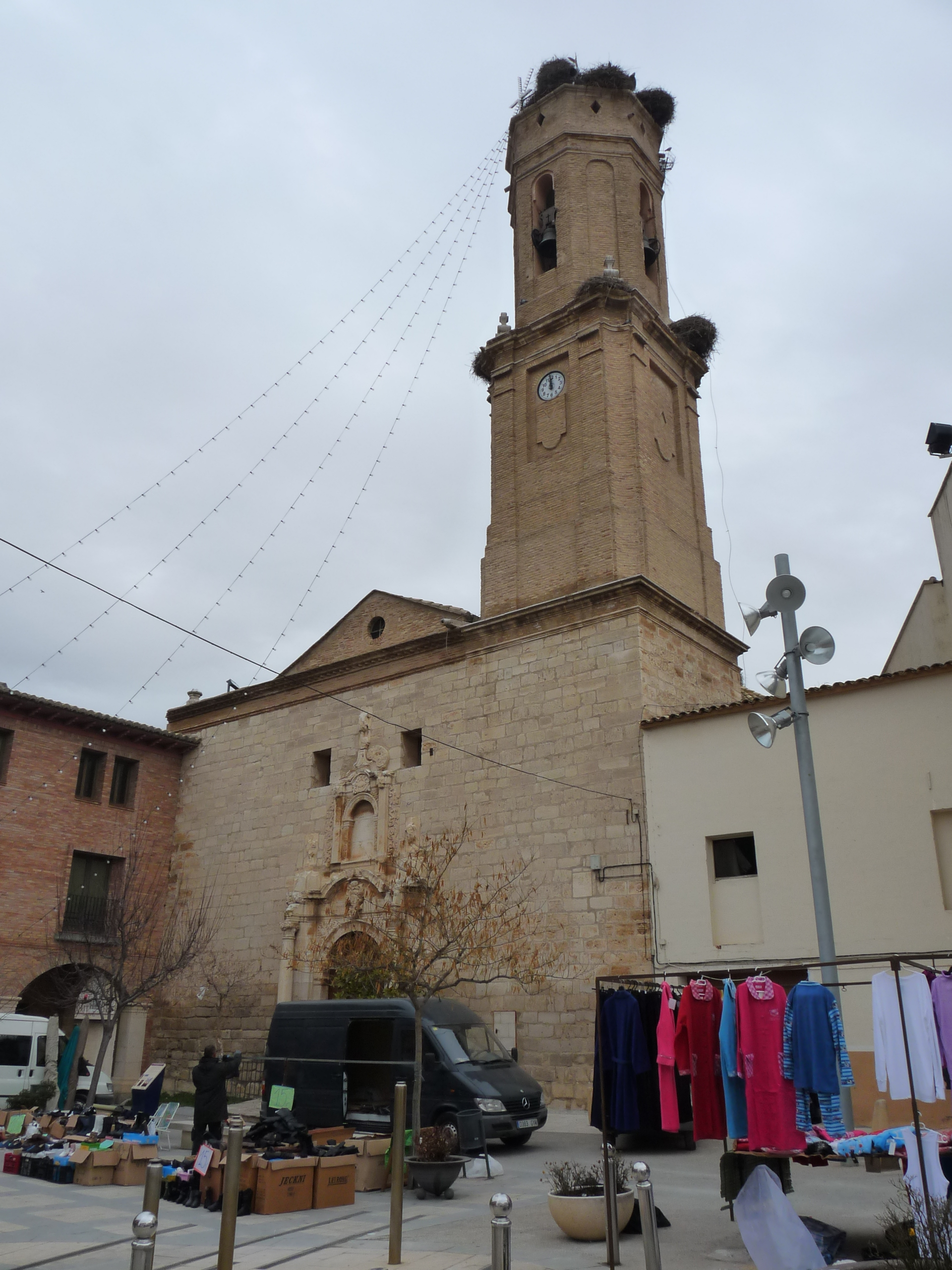 Zaidín - Iglesia de San Juan Bautista (s. XVIII)